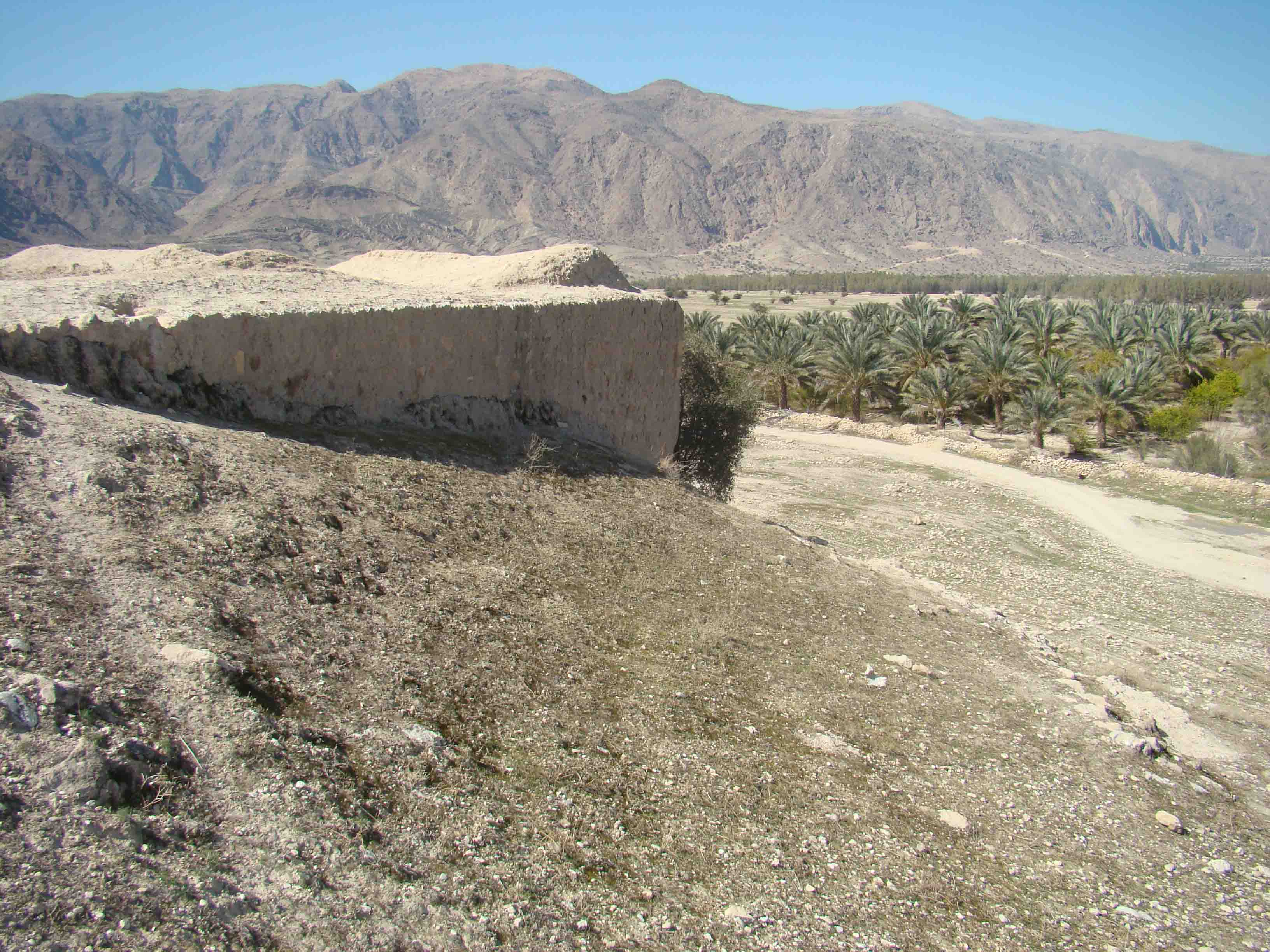 آتشکده اذرفرنبغ کاريان